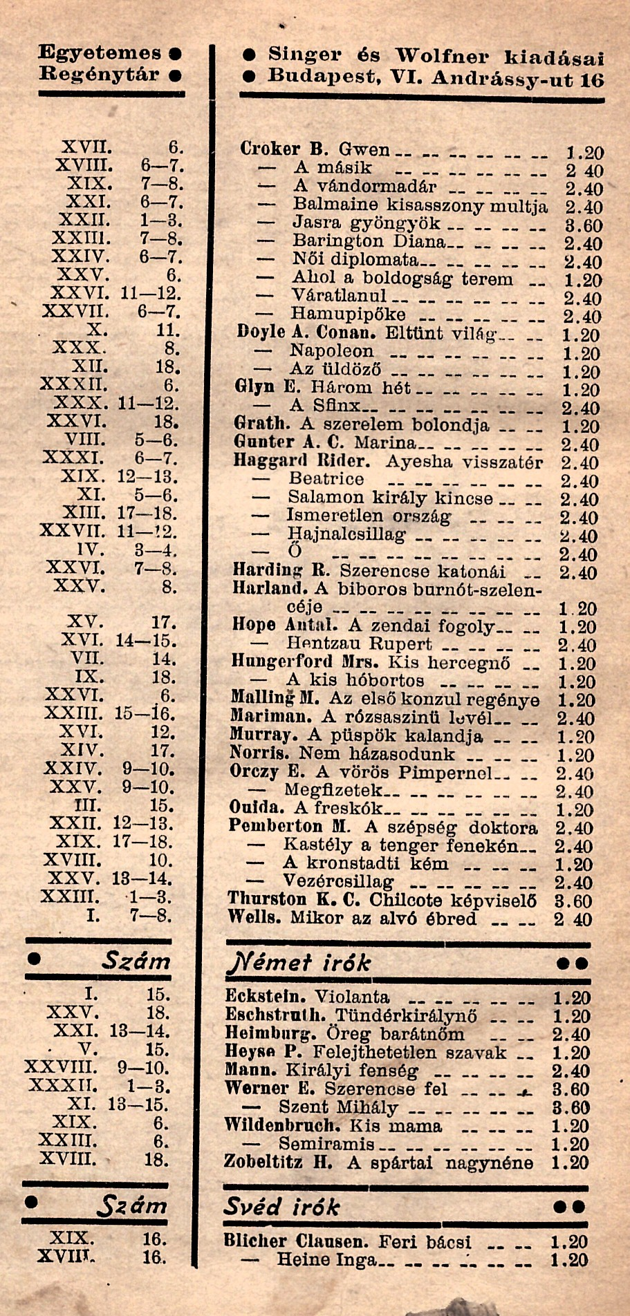 Az Egyetemes regénytár köteteinek jegyzéke (előzéklap Arthur Conan Doyle [1859-1930]: Napoleon [1911, Egyetemes regénytár] kiadásában)